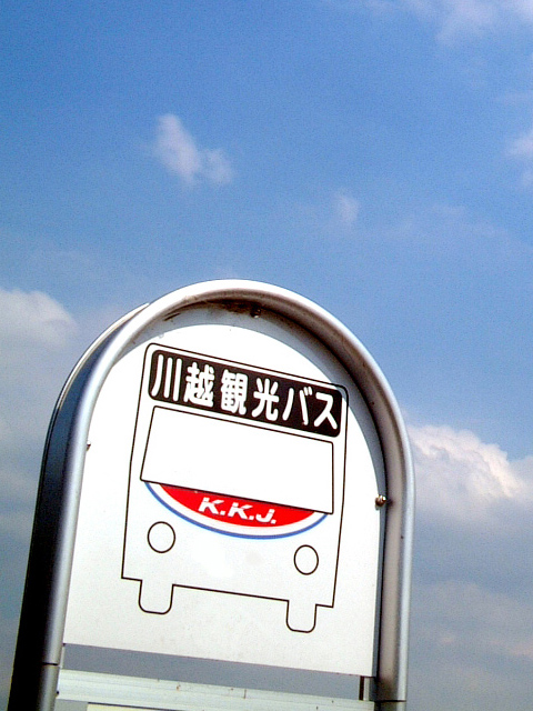 川越観光自動車のバス停標識で用いられる最上部の独自デザイン案内板